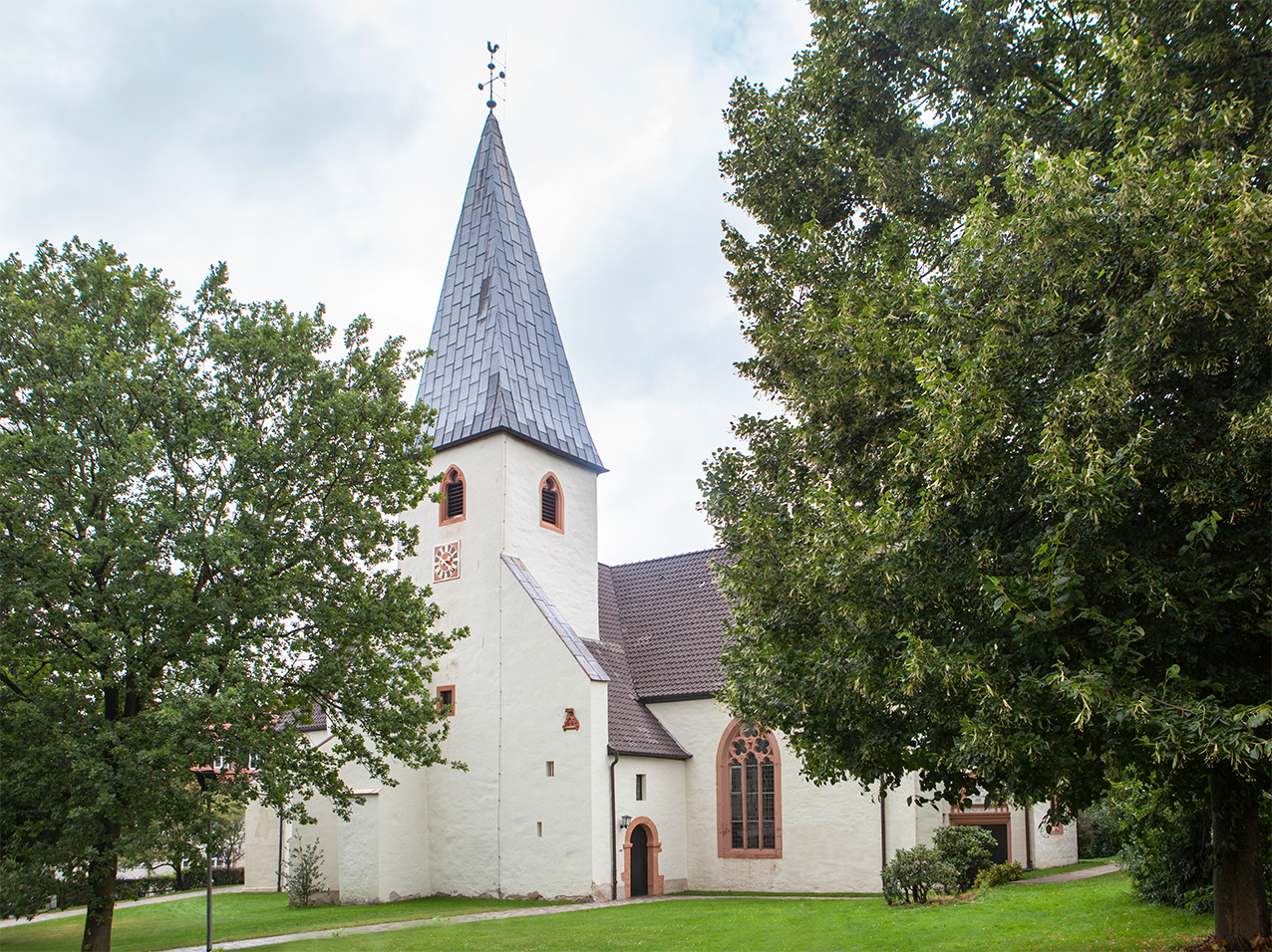 Evangelisch reformierte Kirche in Hohenhausen, Kalletal This is the photograph of an architectural monument. It is part of the list of cultural monuments of Kalletal, no. 6